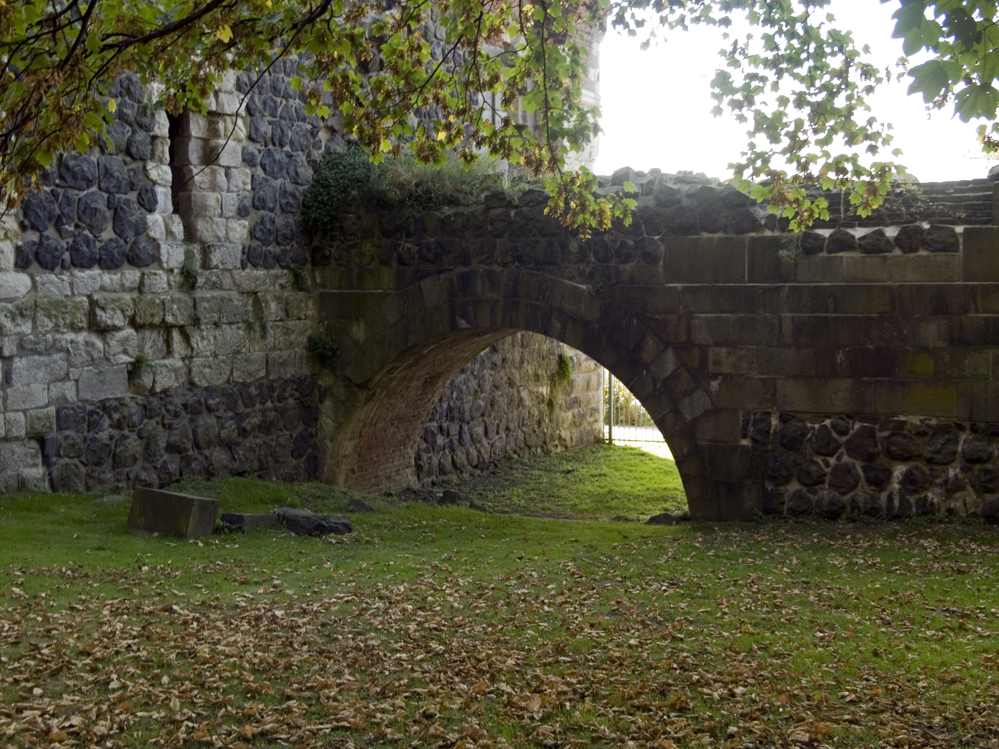 Северный Рейн - Вестфалия, Дюссельдорф - руины императорского дворца в Кайзерверте